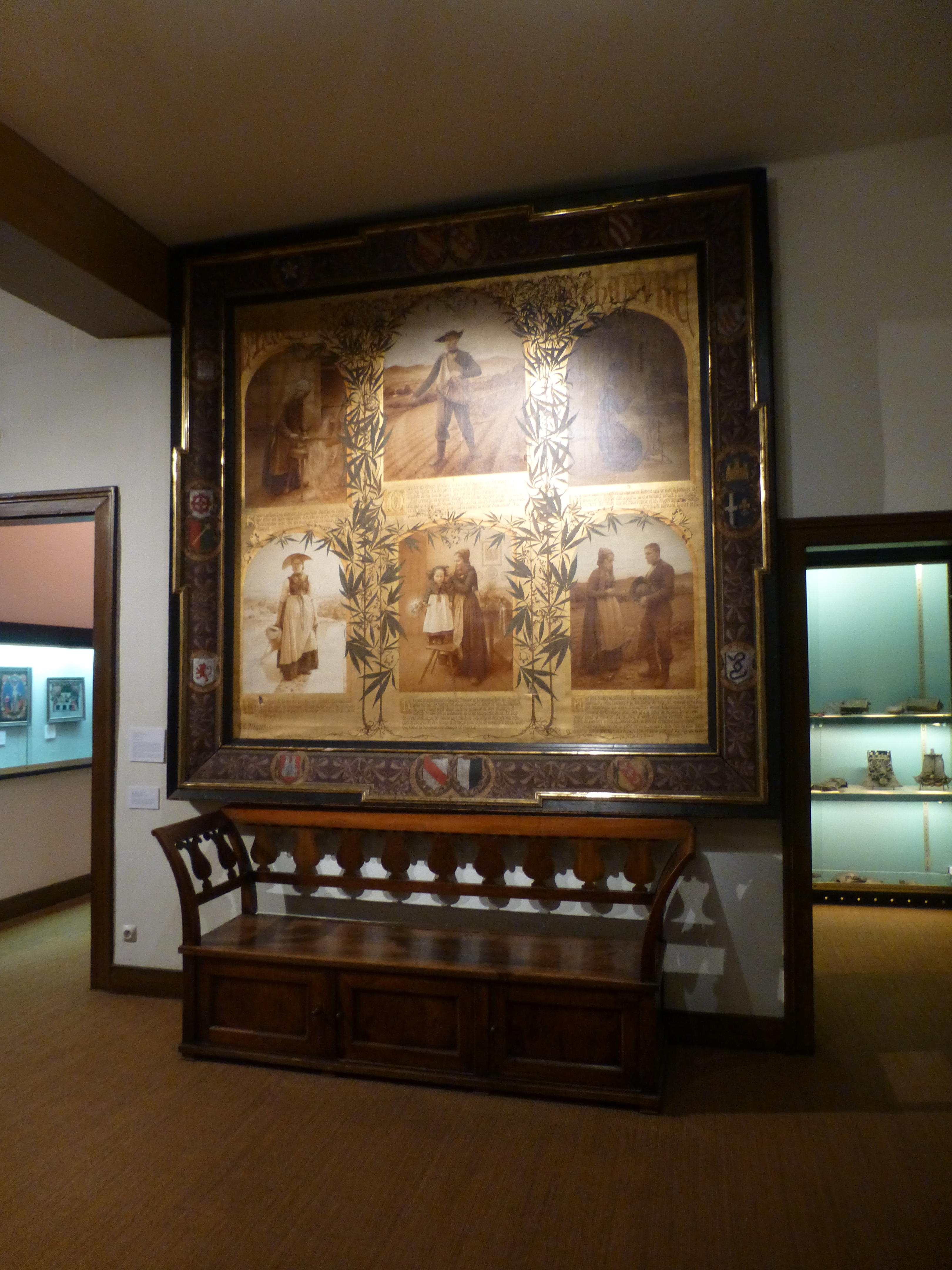 La Légende du semeur de chanvre (1883), de Charles-Émile Matthis. Huile sur toile. 260 x 260 cm. Le tableau est divisé en six scènes dorées entourées des vrilles et branches du chanvre. Réalisé sous l'occupation allemande, le peintre a rédigé les textes en français. Musée alsacien de Haguenau (Bas-Rhin). N° d'inventaire : 2013.0.304 BA